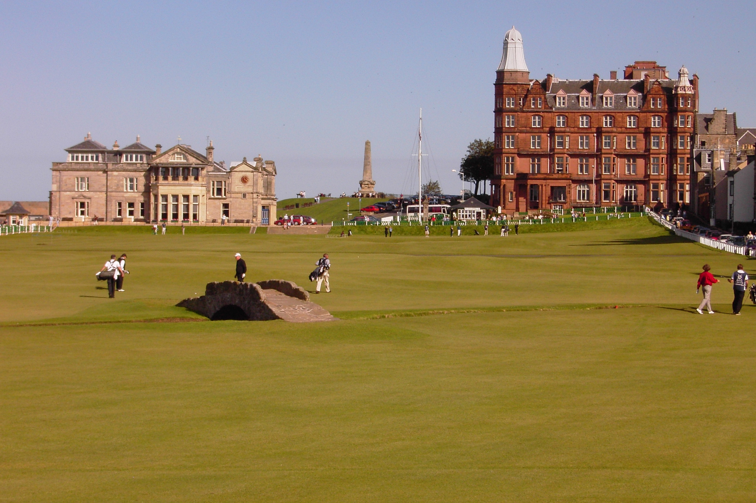 St. Andrews (Old Course/Swilken Bridge/Royal and Ancient Golf Clubhouse)